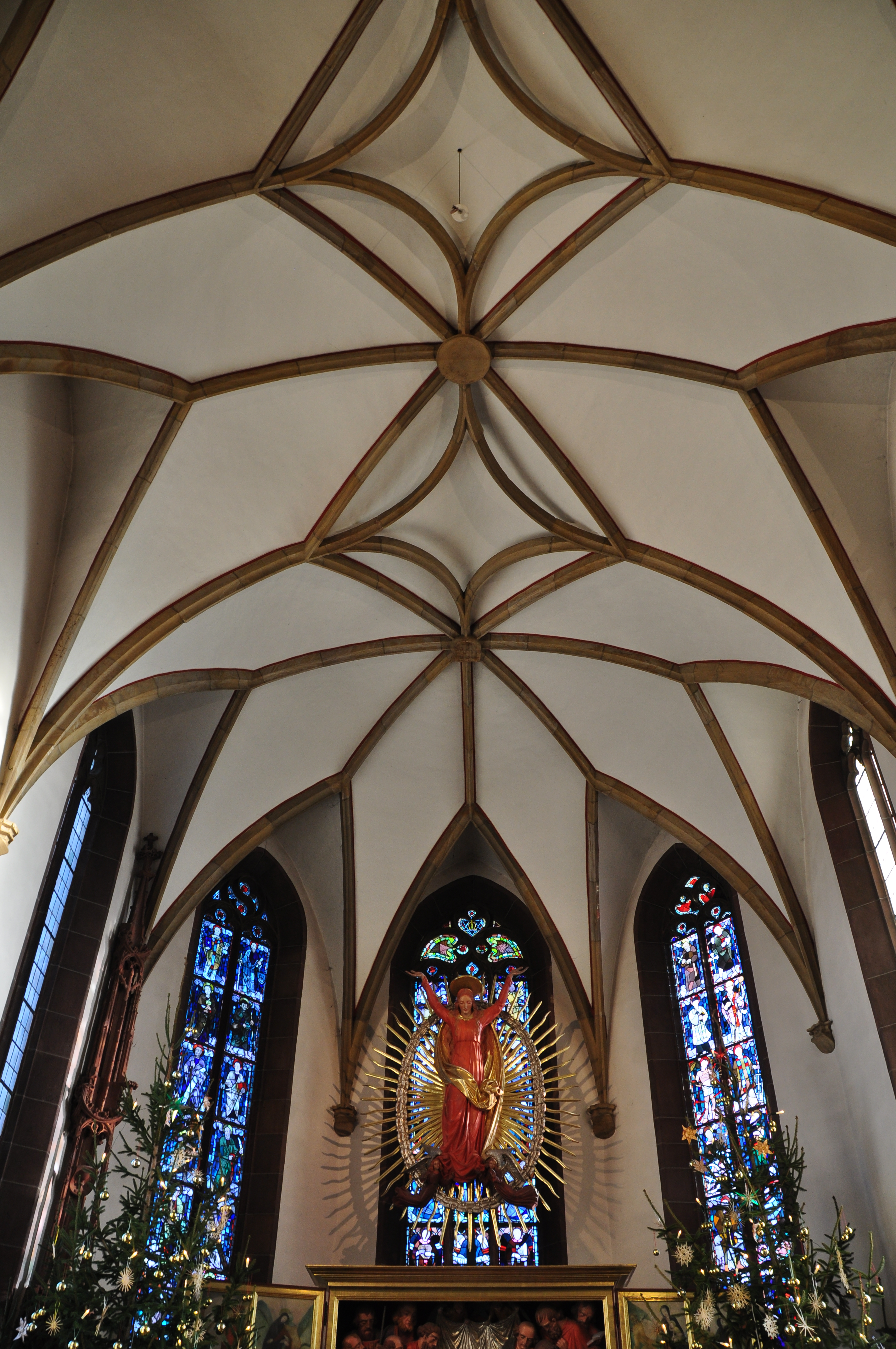 Spätgotischer Chor von 1507, Kath. Pfarrkirche St. Maria Himmelfahrt Herxheim